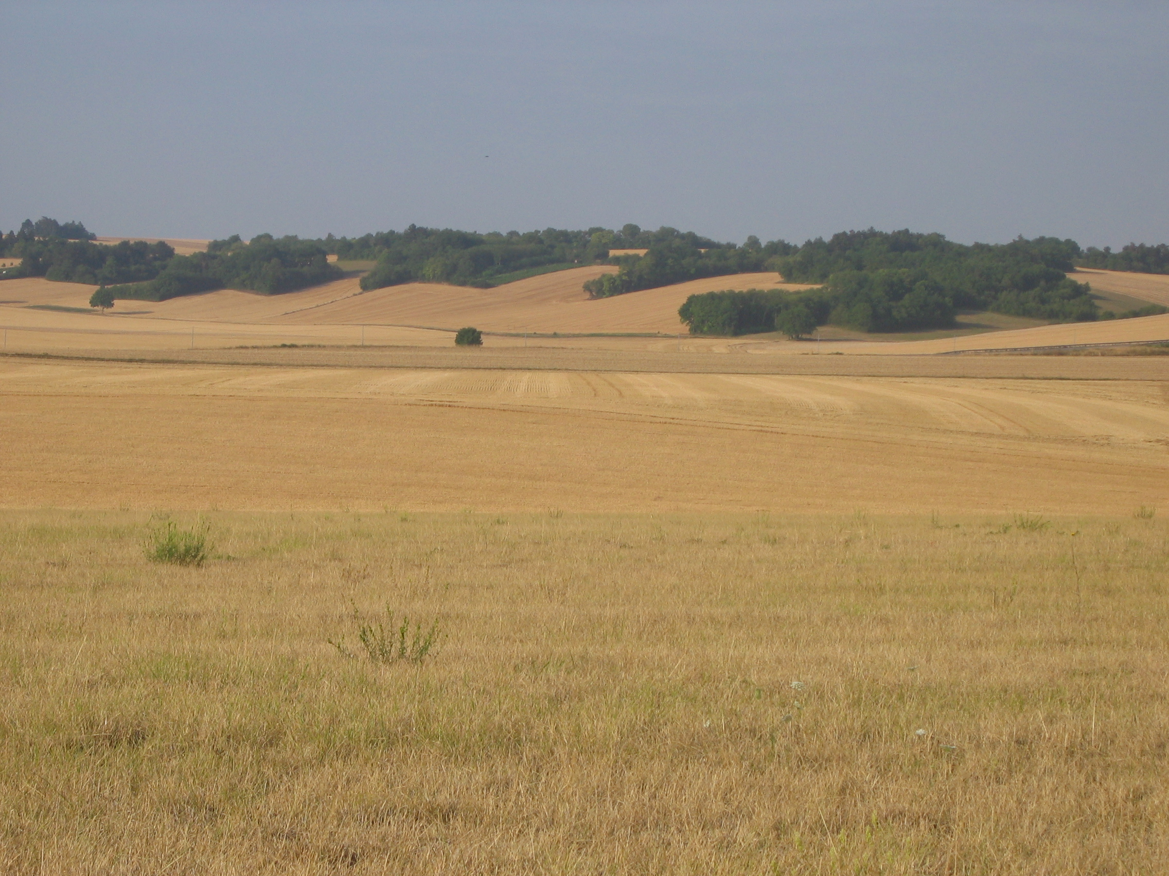 Paysage de l'Auxerois ; photo prise entre Chablis et Noyers dans l'Yonne, Bourgogne, France